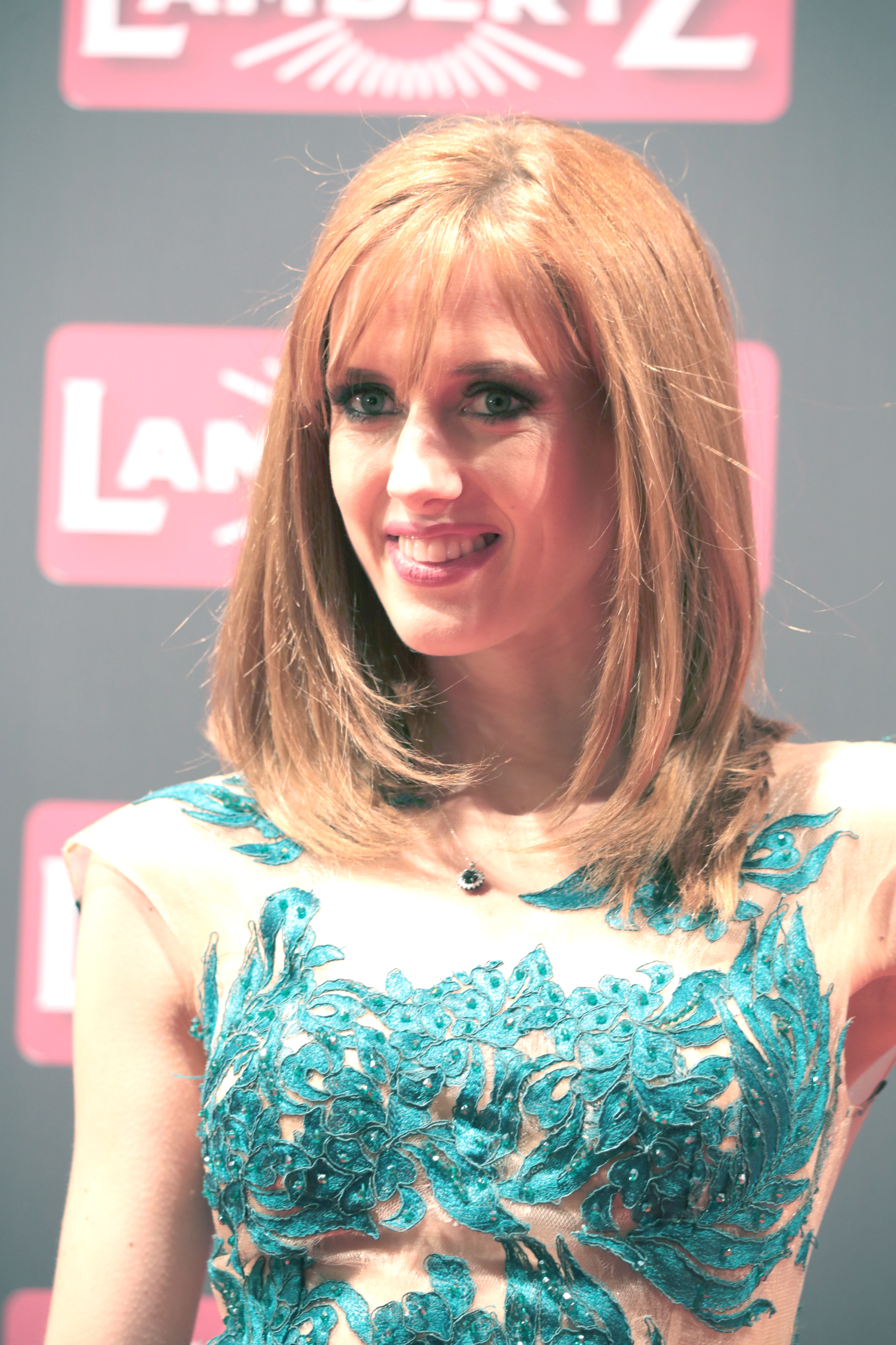 Wilma Elles bei der Lambertz Monday Night 2018.